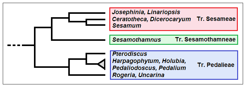 Pedaliaceae - Cladogramma della famiglia